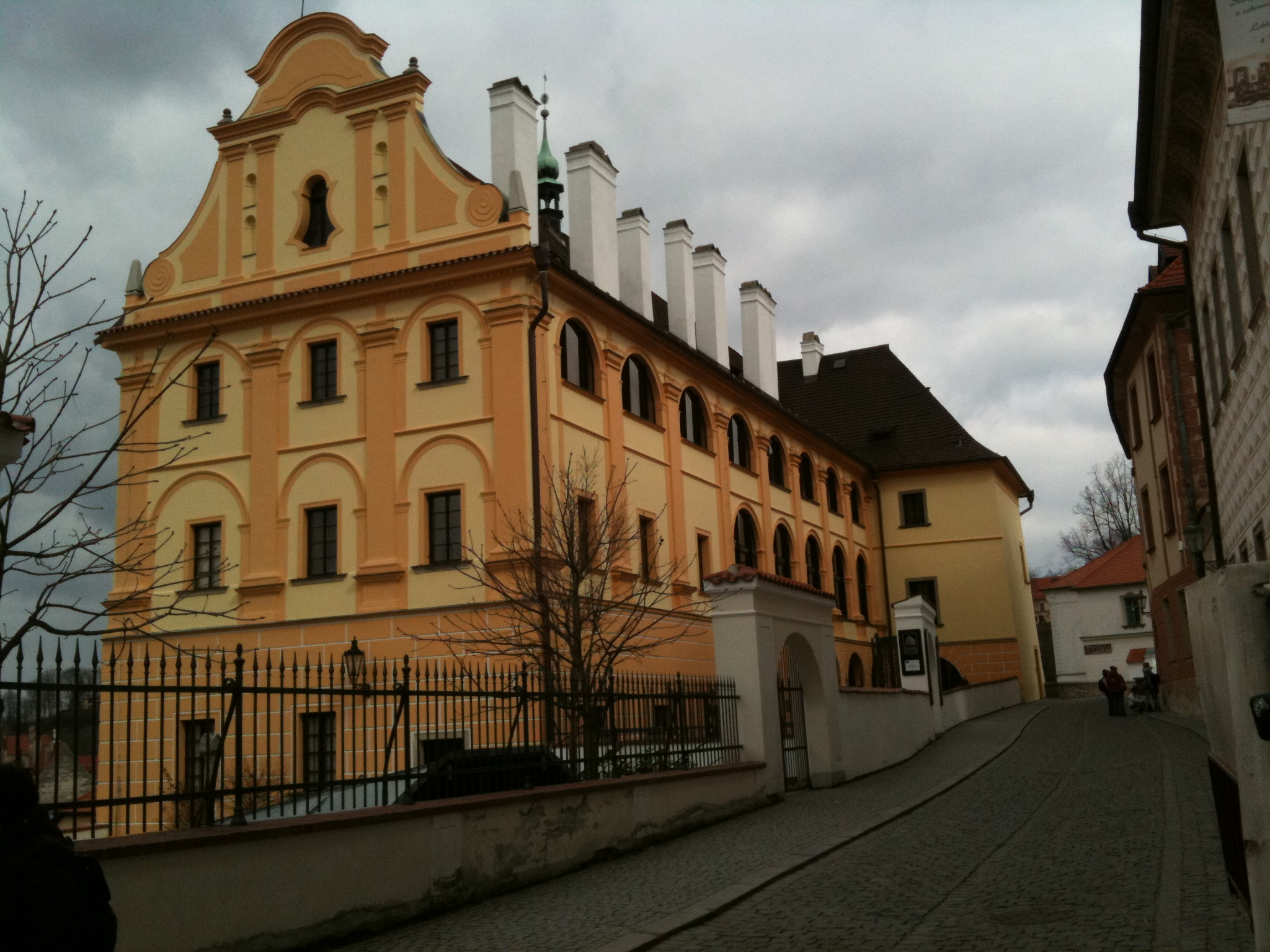 381 01 Český Krumlov, Czech Republic